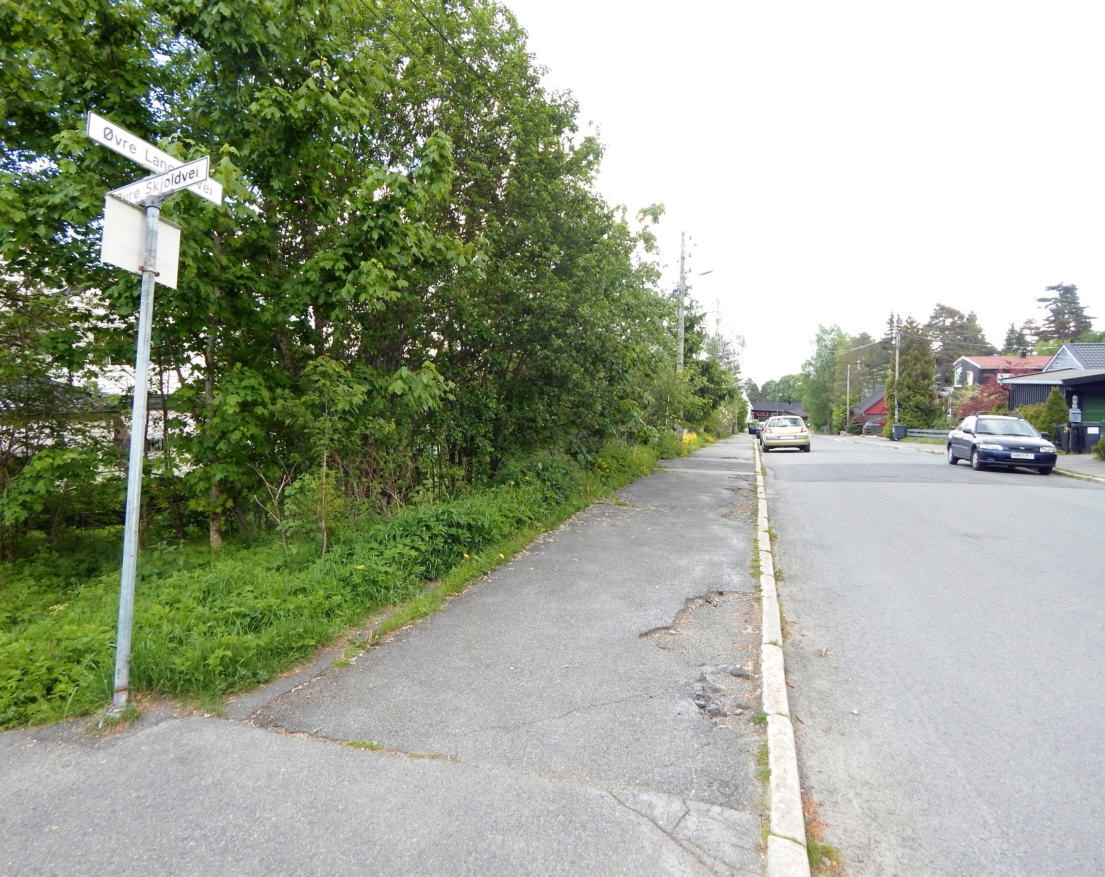 Øvre Langås vei